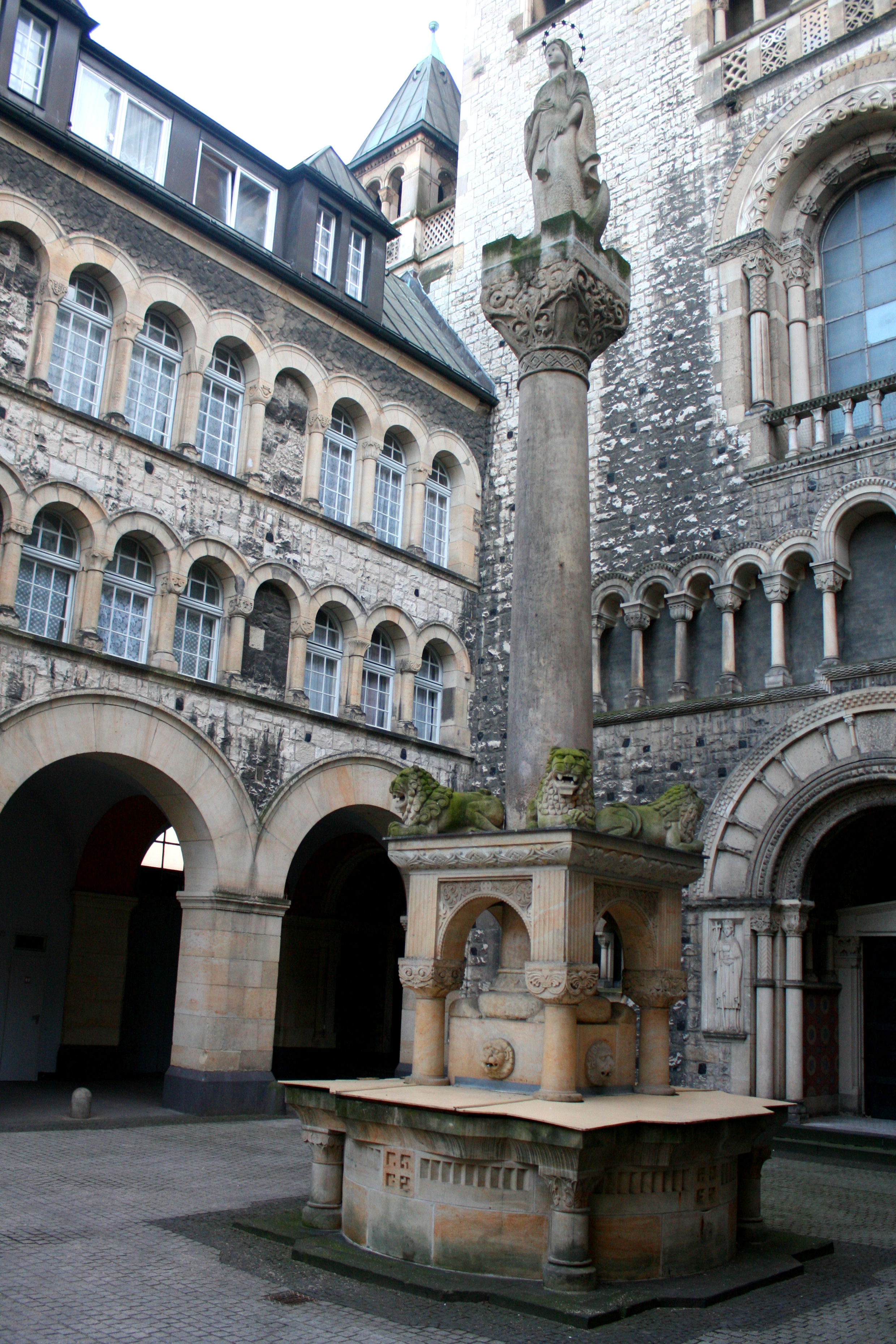 Brunnen mit Marienstatue auf dem Vorplatz der St.-Marien-Kirche (Berlin-Kreuzberg)